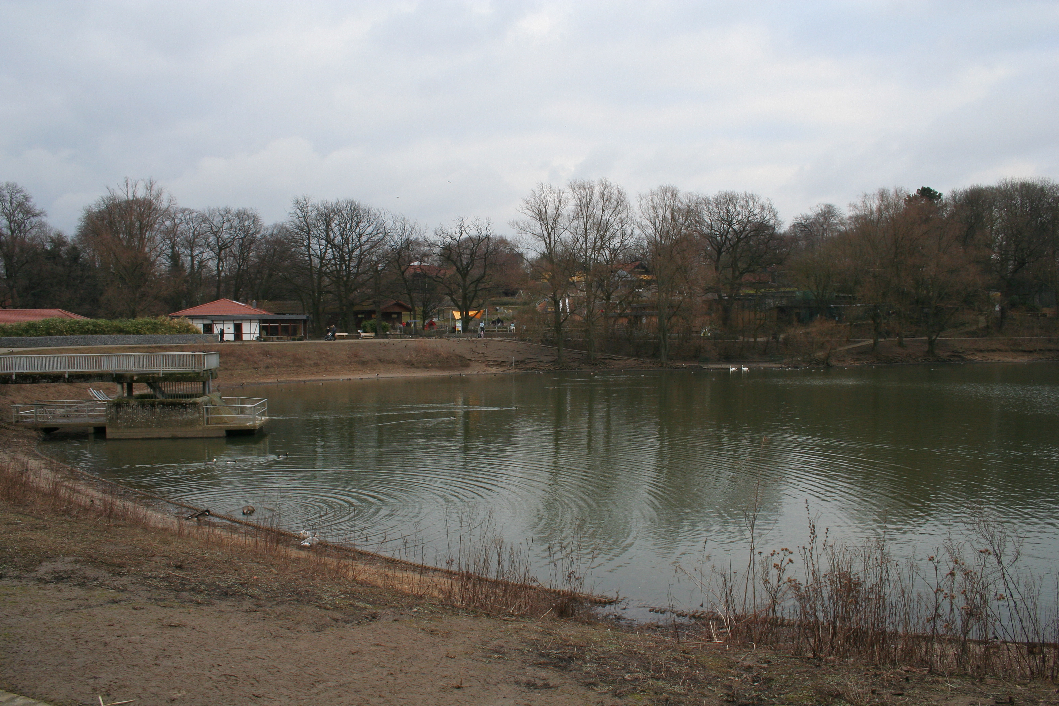 Aachener Tierpark Euregiozoo. Großer Teich.